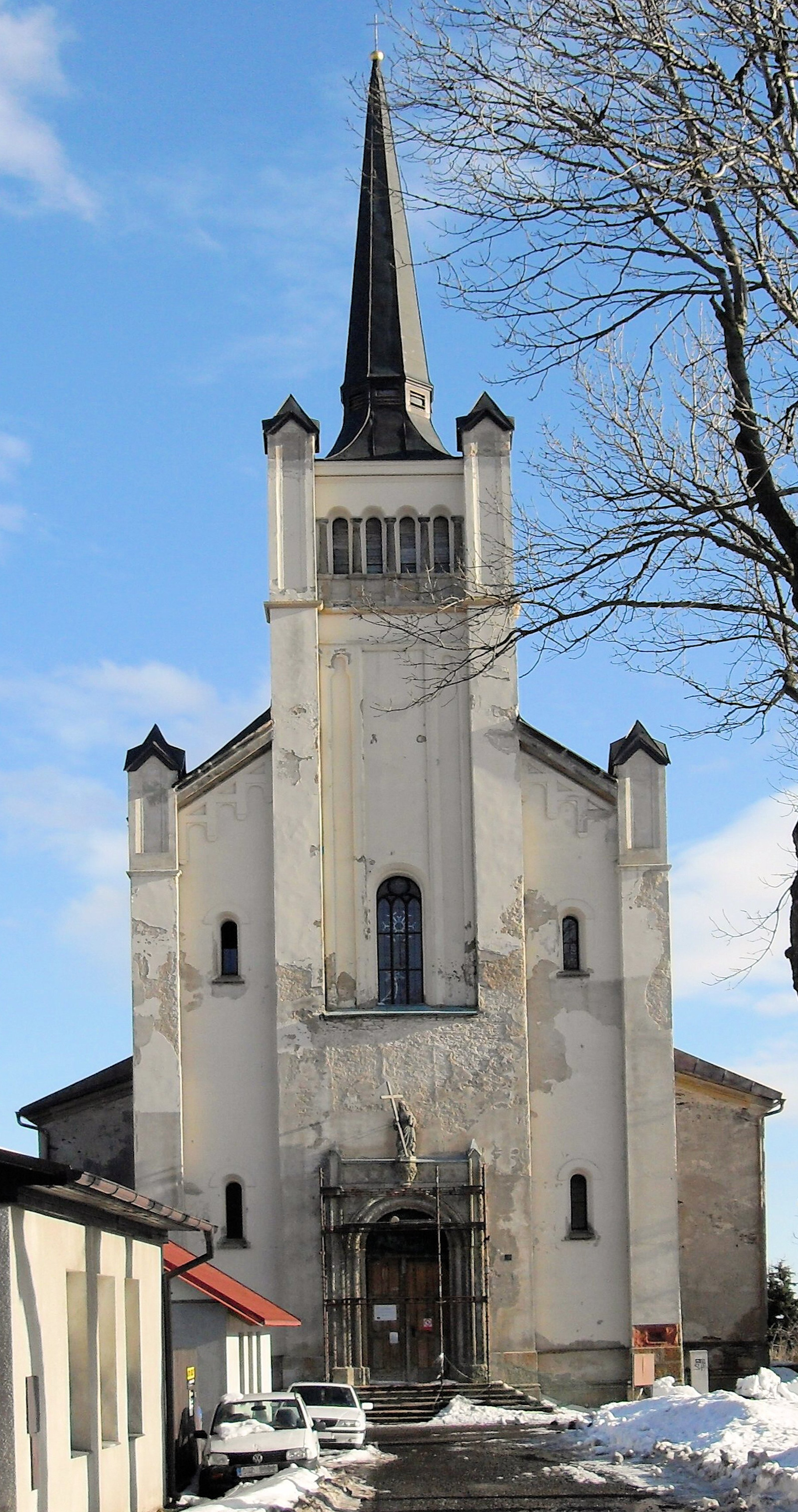 Výsluní, Kostel svatého Václava